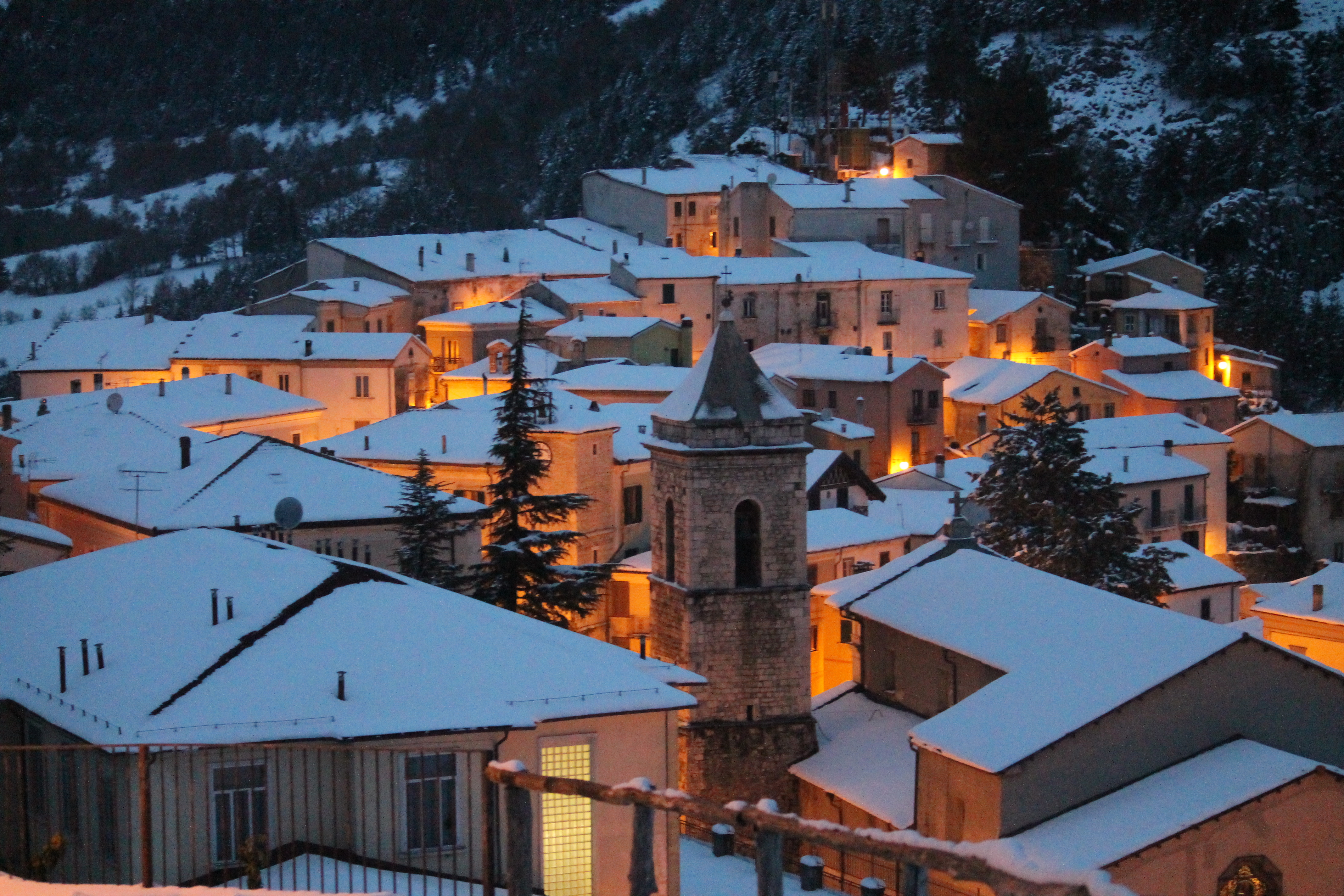 Chiesa di Santa Maria Assunta This is a photo of a monument which is part of cultural heritage of Italy.